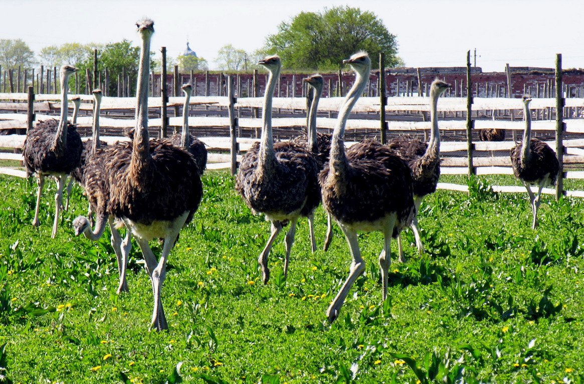 Stručiai Tiskūnų stručių fermoje Kėdainių raj. 2007 m. gegužės 6 d., Lietuva